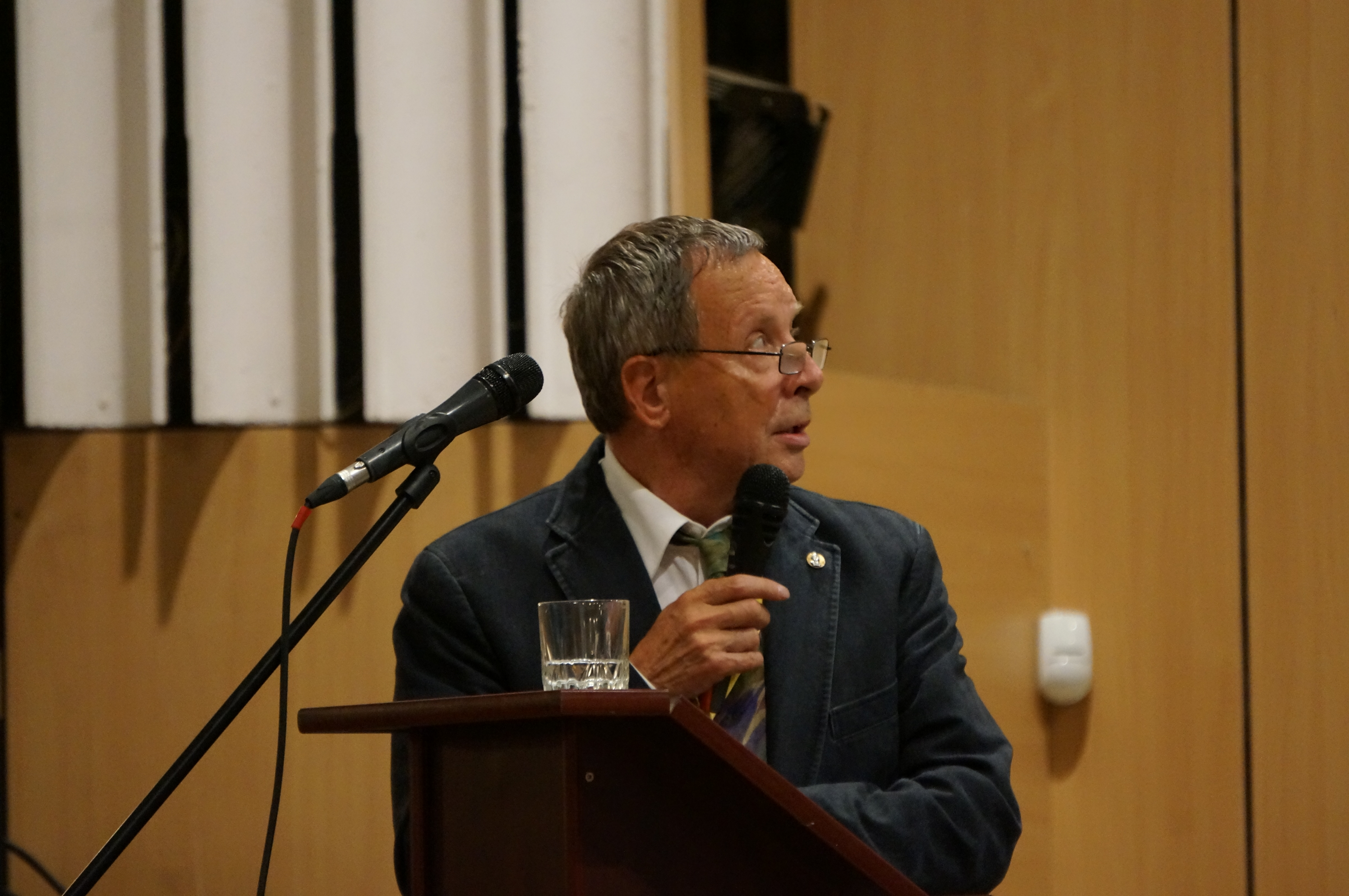 Гамалей Юрий Петрович, XIII съезд Русского ботанического общества. Тольятти, 2013 год.